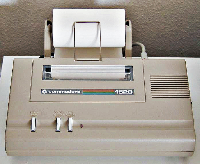 Plotter CBM 1520 fuer C64/SX64